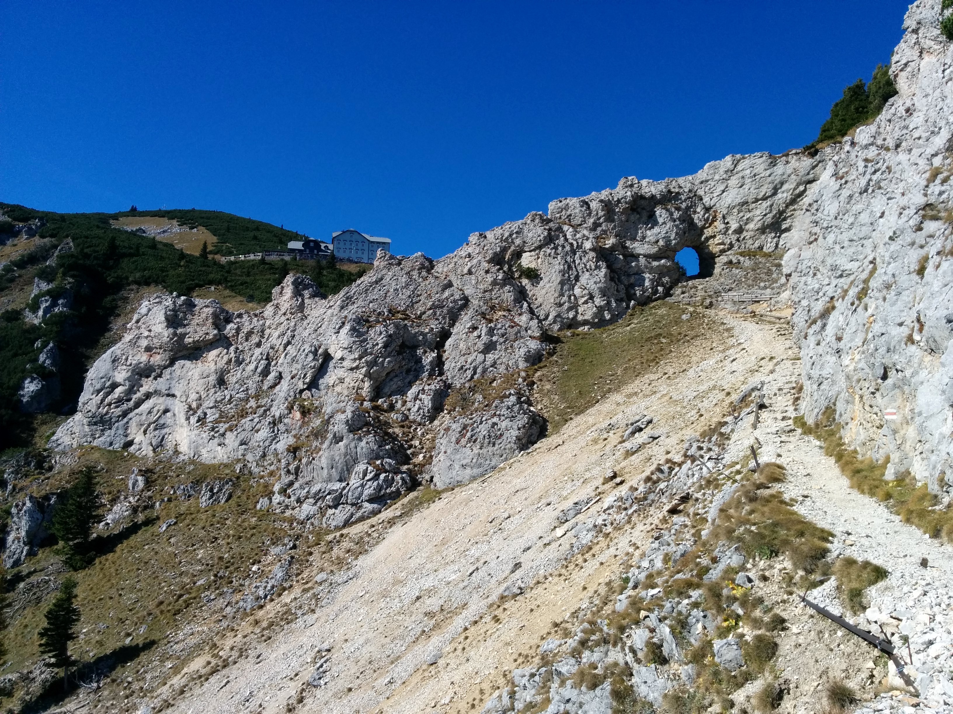 Das Törl im oberen Bereich des Törlweges, dahinter das Otto-Schutzhaus